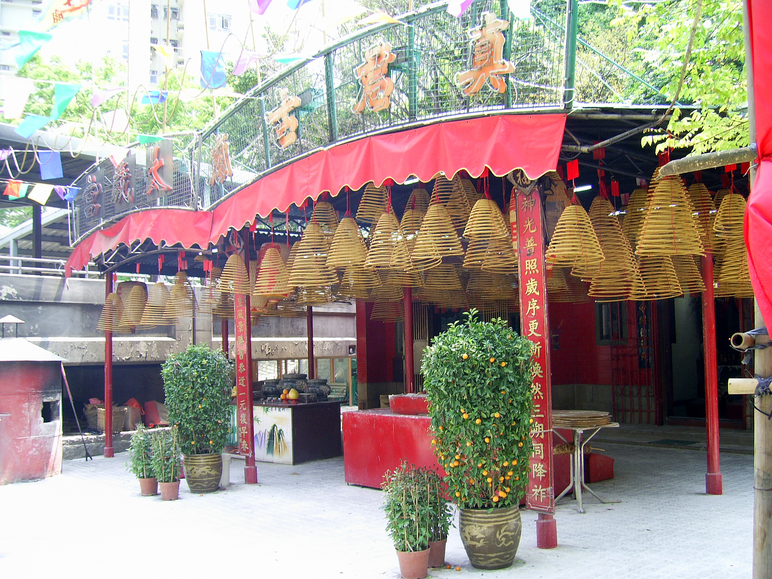 中文（香港）: 真君廟